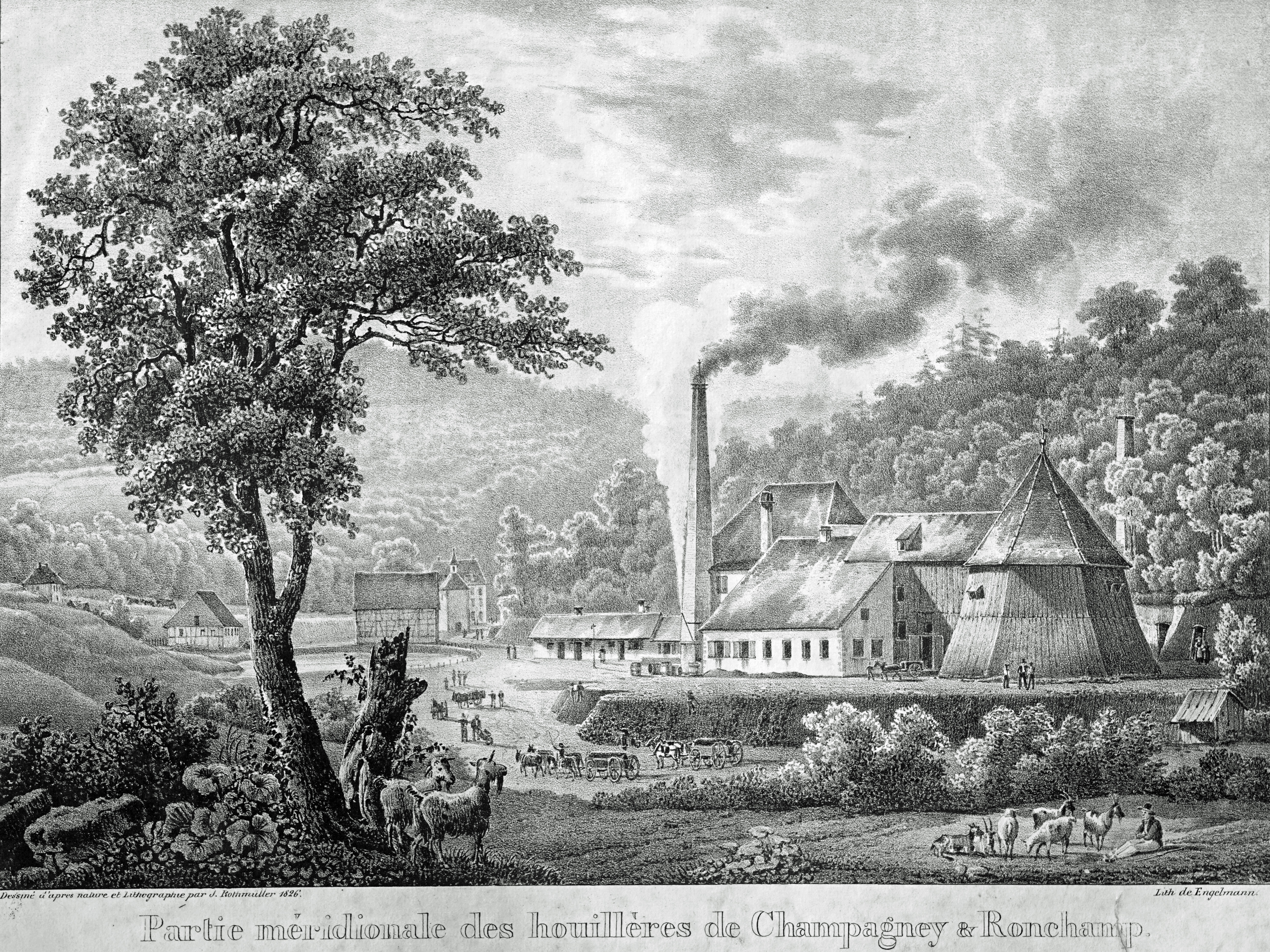 Le puits Saint-Louis en 1826, de gauche à droite : les bâtiments des houillères à l'arrière plan, la haute cheminée des chaudières, le bâtiment de la machine à vapeur et de la bobine, le bâtiment recouvrent le puits et l'ancien barritel. La cheminée de droite située derrière les arbres est un toc-feu, dispositif qui permet d'évacuer l'air vicié des mines grâce à une source de chaleur.